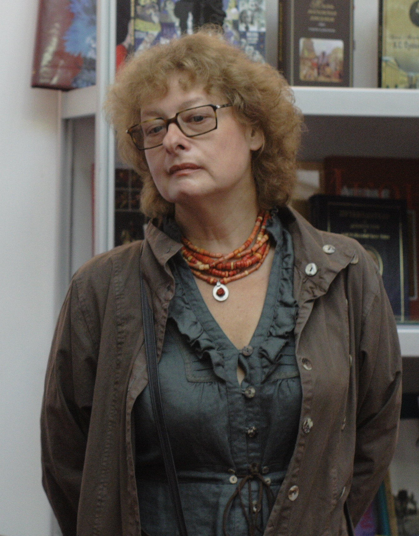 Маргарита Хемлин, русский писатель